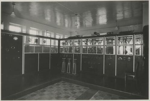 Новая радиотрансляционная станция в Ласнамяэ (Таллин), 1935 год